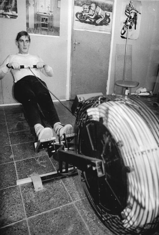 Mario Kliesch ADN-ZB Mittelstädt 5.2.90 Berlin: Rudertraining- "Convept II", ein in den USA entwickeltes Ruderergometer steht den Ruderern, hier Mario Kliesch (Vizeweltmeister im Achter 1989), seit November 1989 zur Verfügung. Erstmalig fahren die besten drei DDR-Frauen und -Männer Mitte Februar zu den zweiten Welttitelkämpfen an diesem Gerät nach Boston, die von der Herstellerfirma gesponsort wird. - Die im Besitz der DDR-Klubs befindlichen Geräte wurden fast ausnahmslos als Preise bei Regatten im Ausland gewonnen.